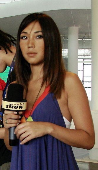 A atriz e apresentadora brasileira Daniele Suzuki no Campus Party Brasil 2008.